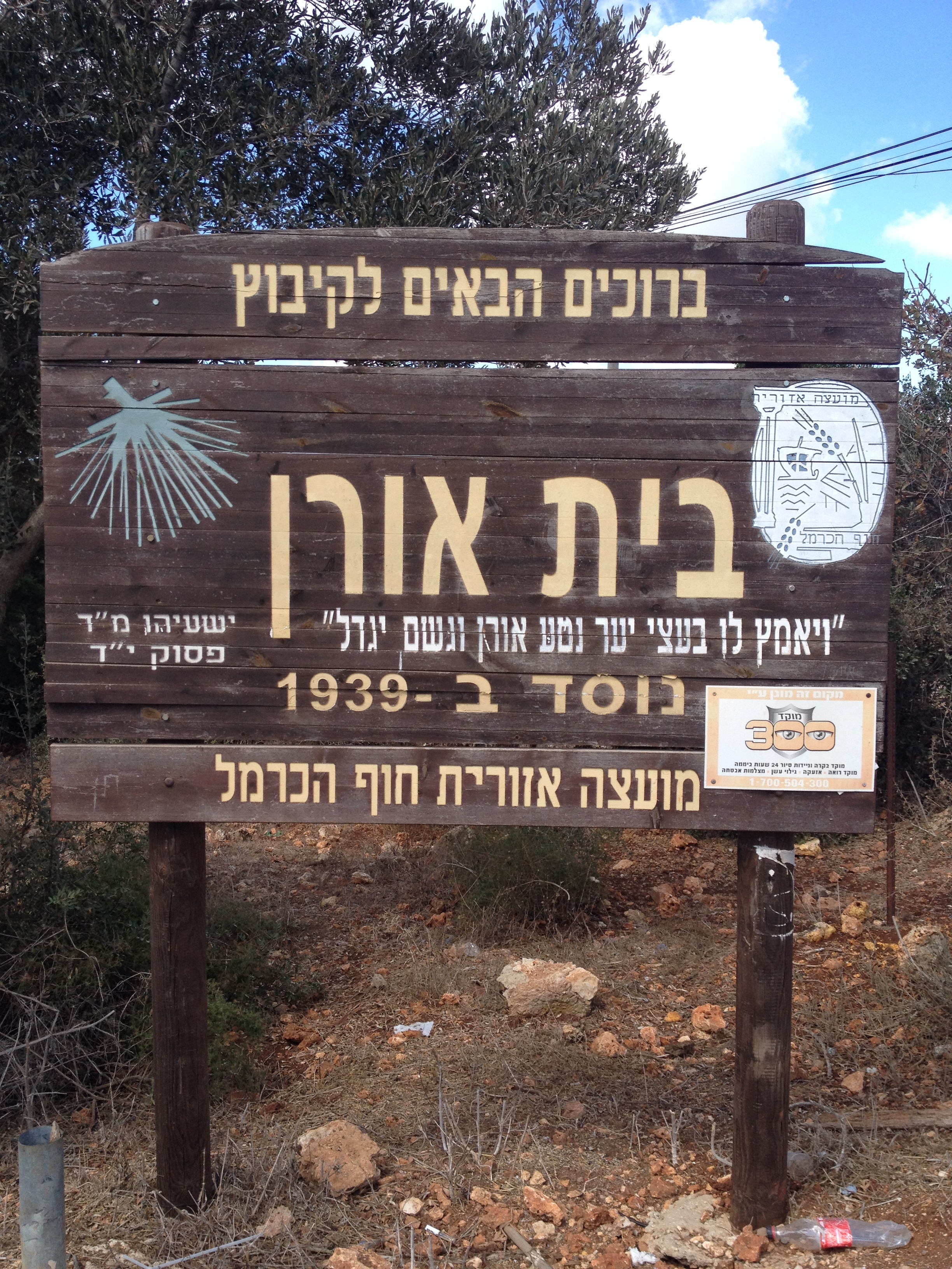 Знак, на котором написано, что киббуц основан в 1939 году